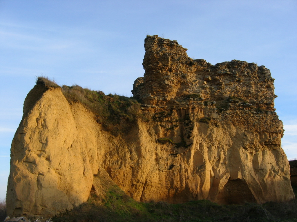 Castillo de Castrillo de Villavega desde el que se podía controlar el vado del río Valdavia. Los restos que aún perviven, constituyen un valioso y extraño ejemplo de Fortaleza de Repoblación, y nos permite tener una idea de como pudo ser el Castillo de Agüero (Buenavista de Valdavia), el cual sirvió de cabecera en la repoblación del Valle de la Valdavia, y del cual este castillo de Castrillo de Villavega serviría de avanzadilla.